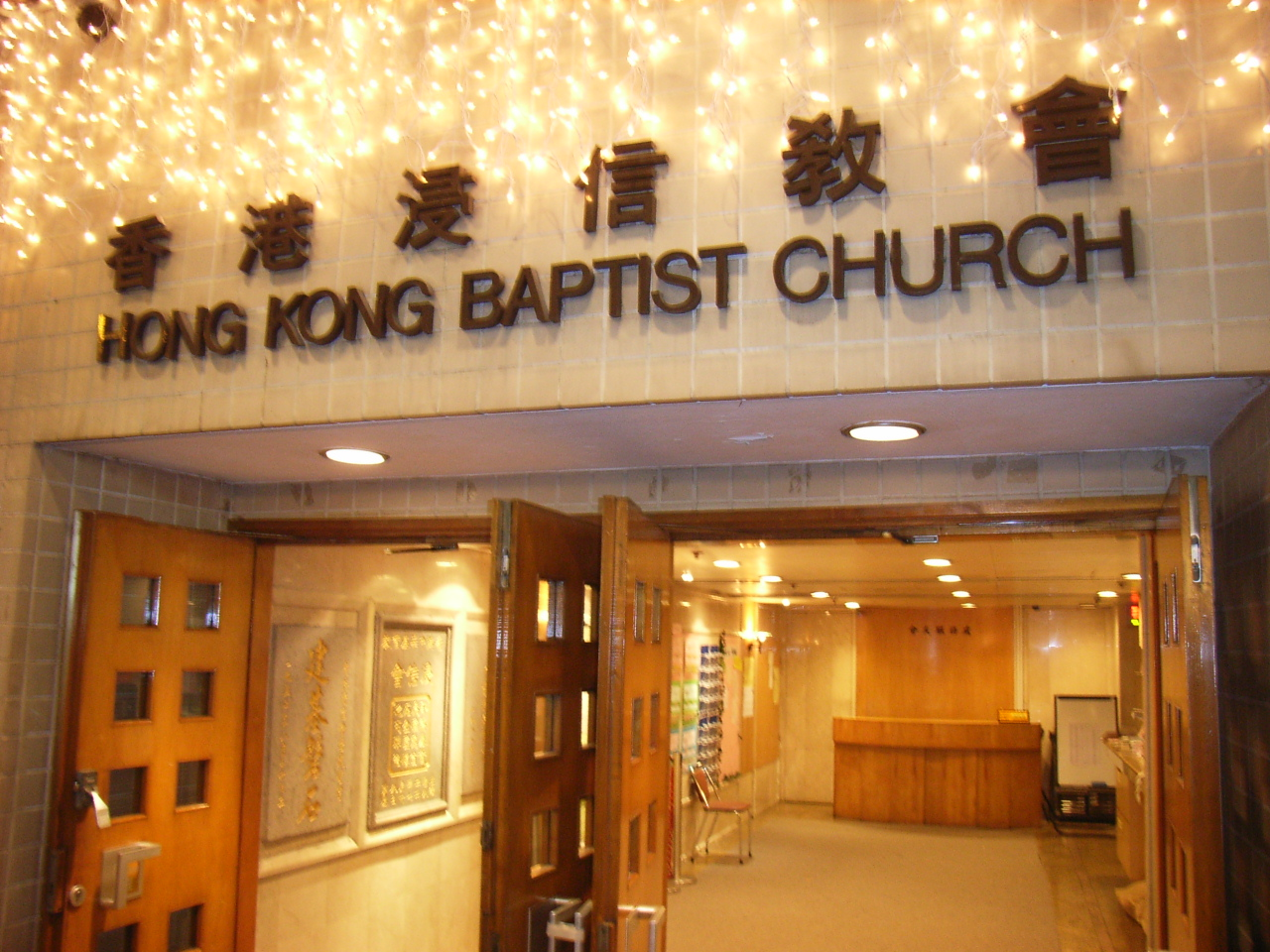 香港浸信會聯會, 堅道50號, 半山區, Caine Road, Hong Kong